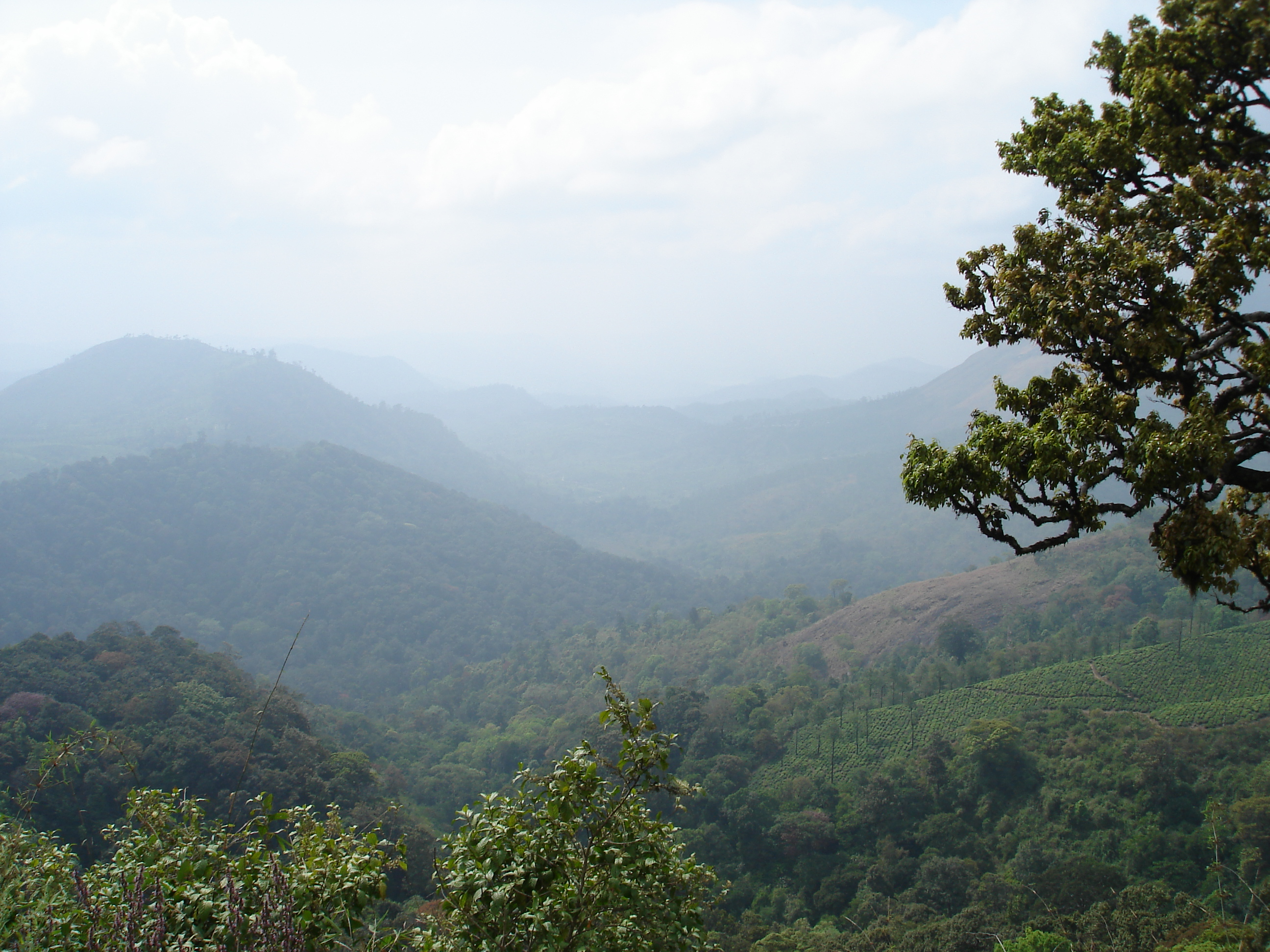 mountains valparai tamilnadu